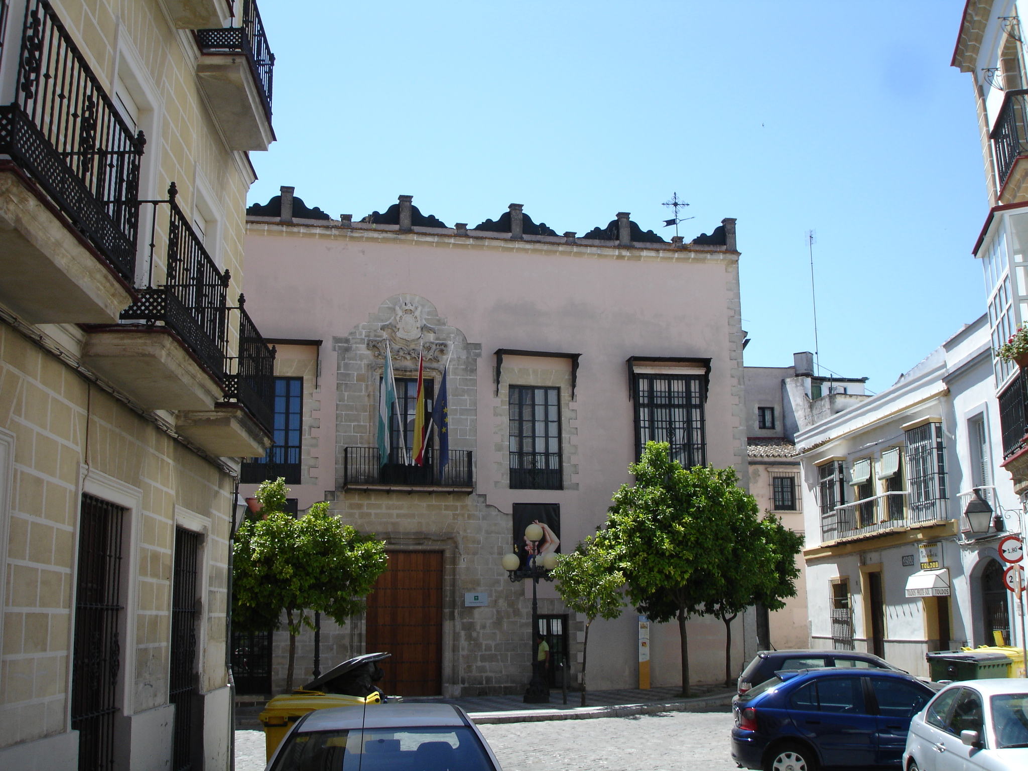 Catedra de Flamencologia. Jerez de la Frontera, Andalusia (Spain).